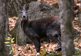 ΄Ενα Ελάφι του Κασμίρ στο Αφγανιστάν